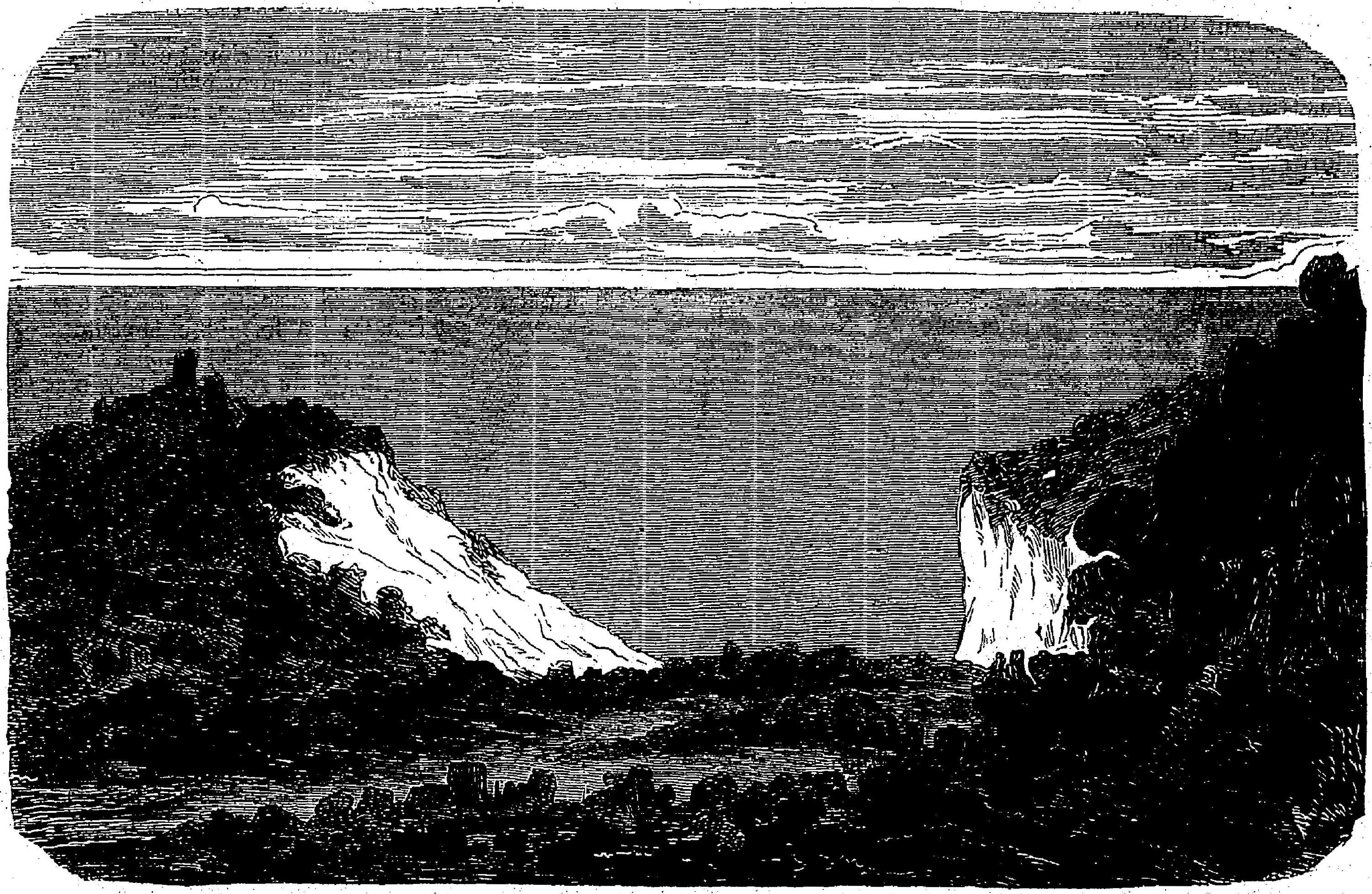 Œuvres illustrées de George Sand, volume 9 Hetzel